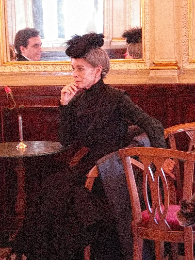 Gerardine Chaplin in una pausa sul set al Caffè Gambrinus di Napoli - Italia.